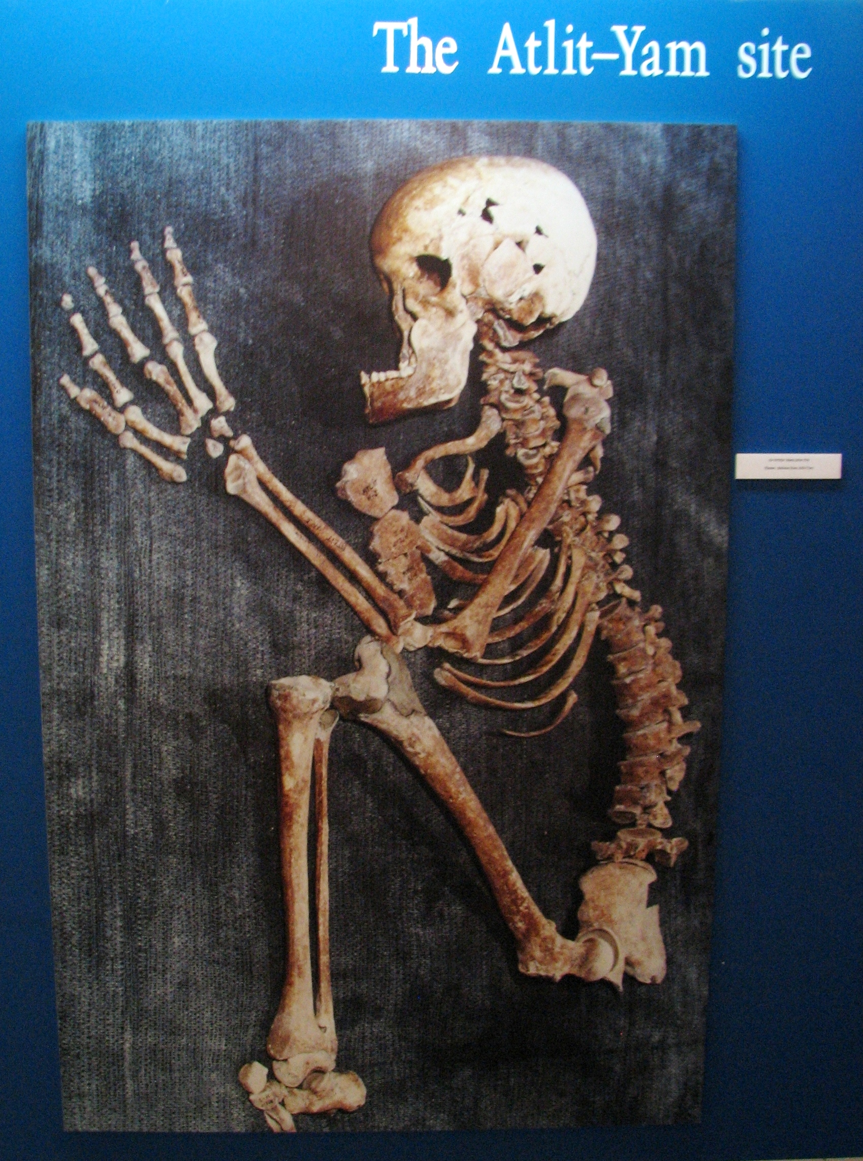 Atlit Yam is an ancient submerged Neolithic village off the coast of Atlit, Israel. The site is dated to the final Pre-Pottery Neolithic B site of Atlit Yam dates between 6900 and 6300 BC. Moshe Stekelis Museum of Prehistory exhibition in Haifa Israel The exhibition is based on the excavations and researches of the Haifa University and Antiquities Authority. Photography by Yosef Galili, Ehud Galili, Itamar Greenberg הכפר הניאוליתי בעתלית-ים שוכן בתוך הים במרחק 400 מטר מקו החוף, מערבית לשפך נחל אורן בעורפו של רכס כורכר טבוע שבהמשכו דרומה נמצא מבצר עתלית הצלבני. האתר נמצא בעומק של 12-8 מטר מתחת לפני הים. האתר מתוארך לסוף התקופה הנאוליתית קדם קרמית ב סוף האלף ה-6 לפנה"ס ממצאים מהאתר מוצגים במוזיאון לפרהיסטוריה ע"ש משה שטקליס בחיפה הנמצא בתוך גן החיות במרכז הכרמל התערוכה מבוססת על חפירות ומחקרים שהתבצעו על ידי אוניברסיטת חיפה ורשות העתיקות הצילומים מהחפירות המוצגים בתערוכה צולמו על ידי יוסקה גלילי, אהוד גלילי ואיתמר גרינברג צילום שלד אדם שנמצא באתר